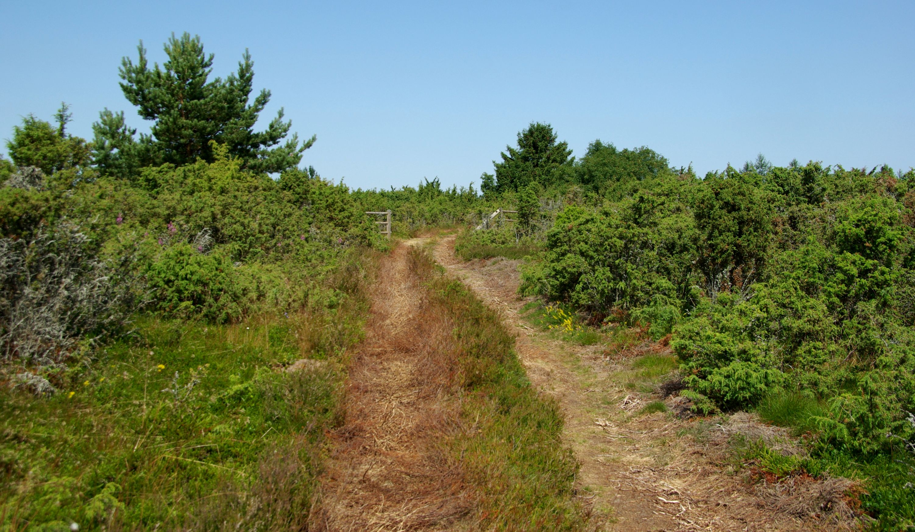 Koipsi(ka Koipse) saar asub Harju maakonnas Jõelähtme vallas Kaberneeme poolsaare otsast 1km põhja pool